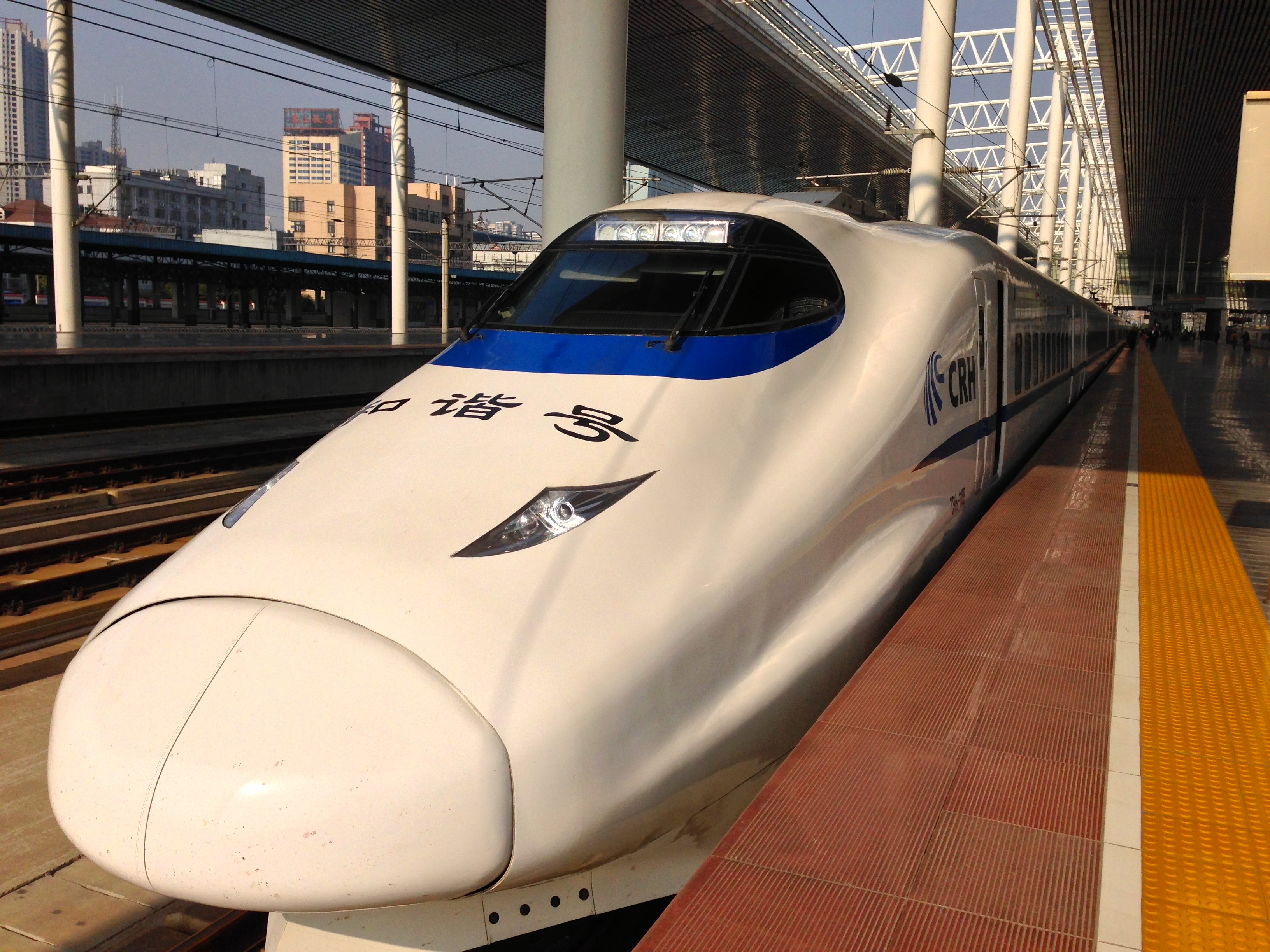 動車